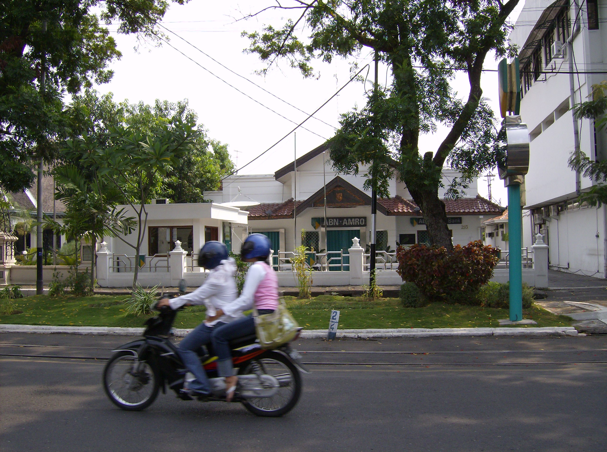 Made by Meursault2004 aka Revo Arka Giri Soekatno